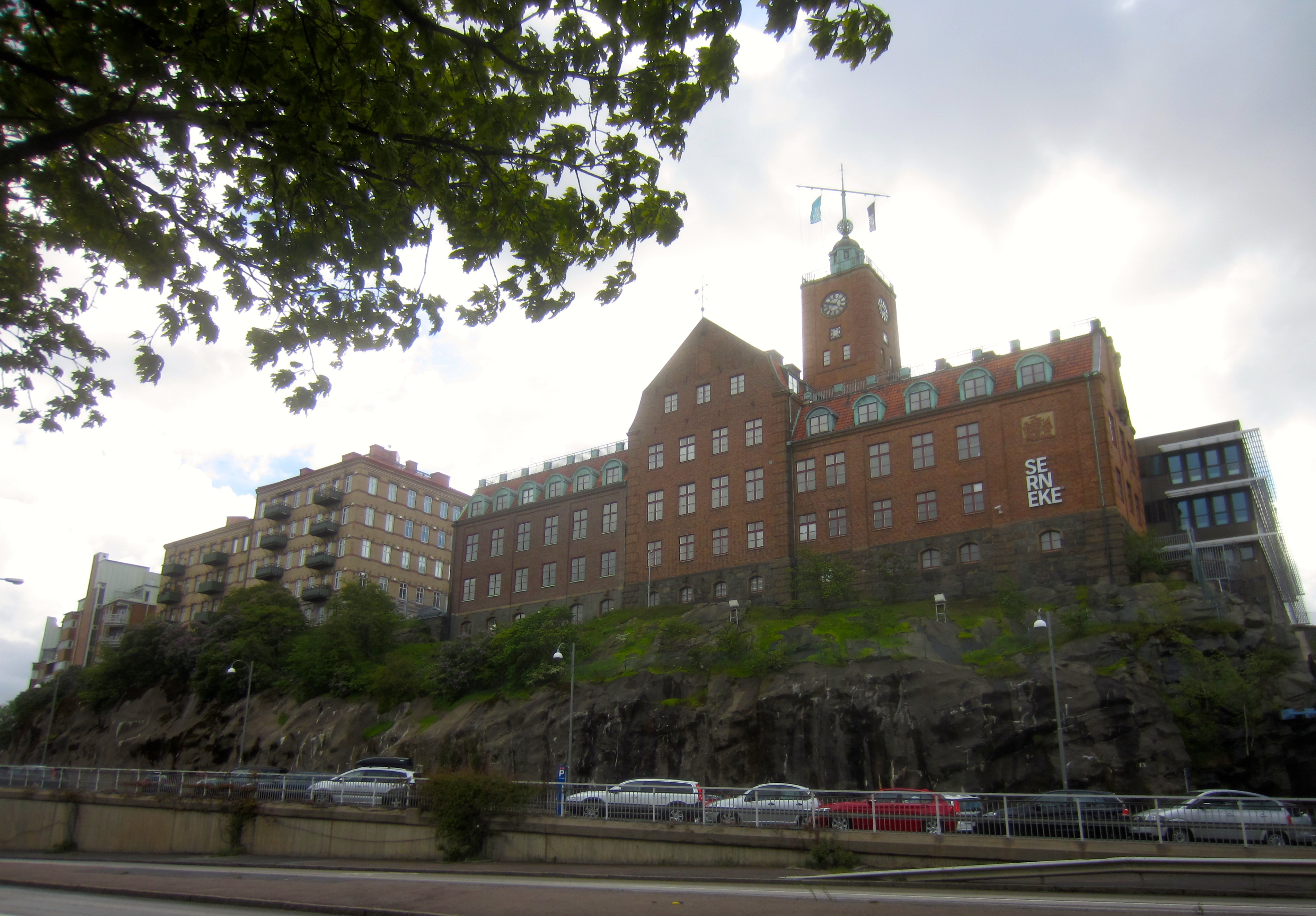 Kvarnberget i Göteborg sett från Packhuskajen.